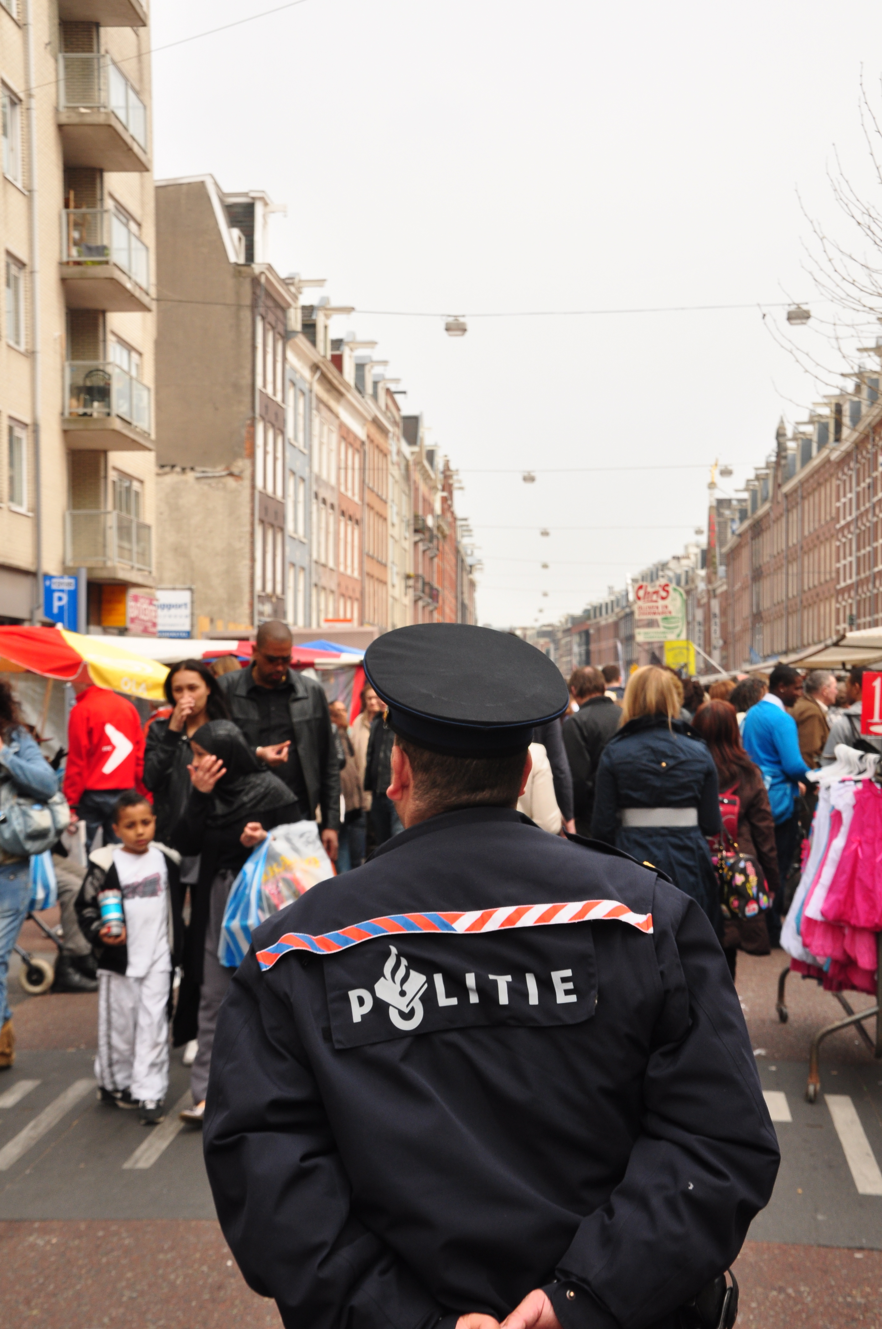 Politeagent Albert Cuypmarkt 2011